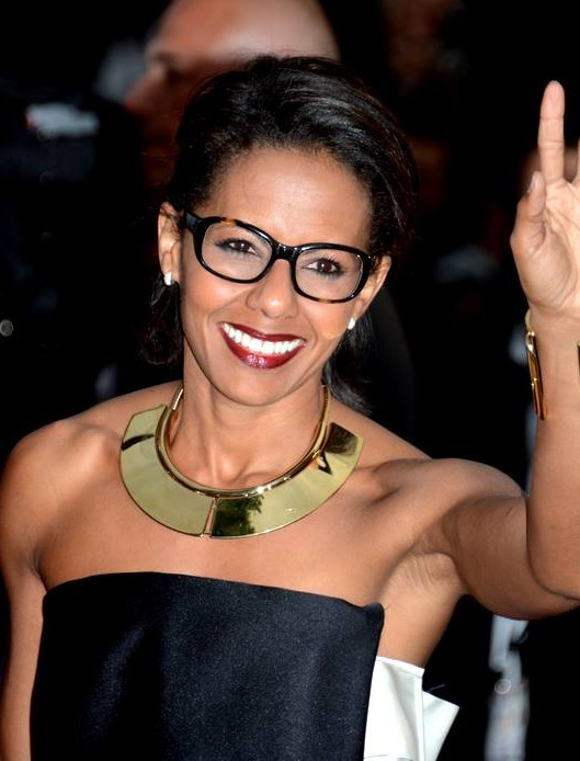 Audrey Pulvar au festival de Cannes